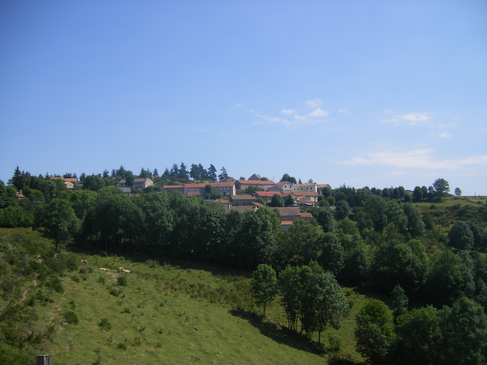 Laubarnès (commune Cheylard-l'Évêque)